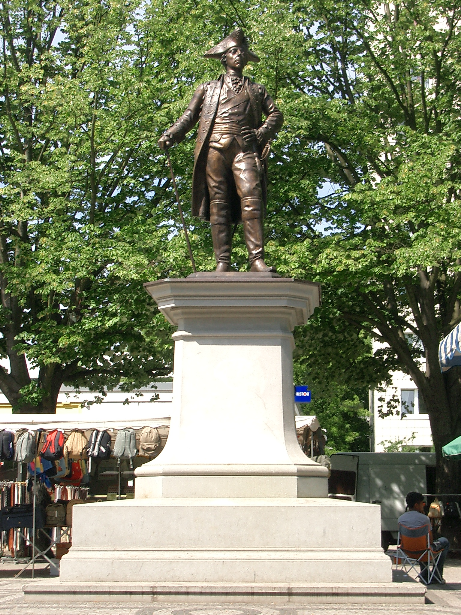 Denkmal von Friedrich II. in Friedrichshagen mit Wochenmarkt. Geschaffen von Spartak Babajan im Jahr 2003.[1]